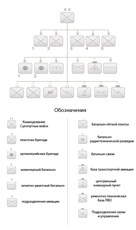 Структура Сухопутных войск Грузии